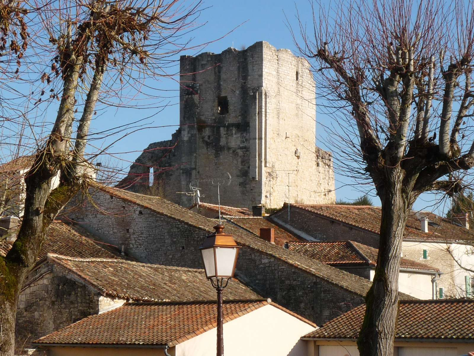 donjon de Marthon vu du centre bourg, Charente, France